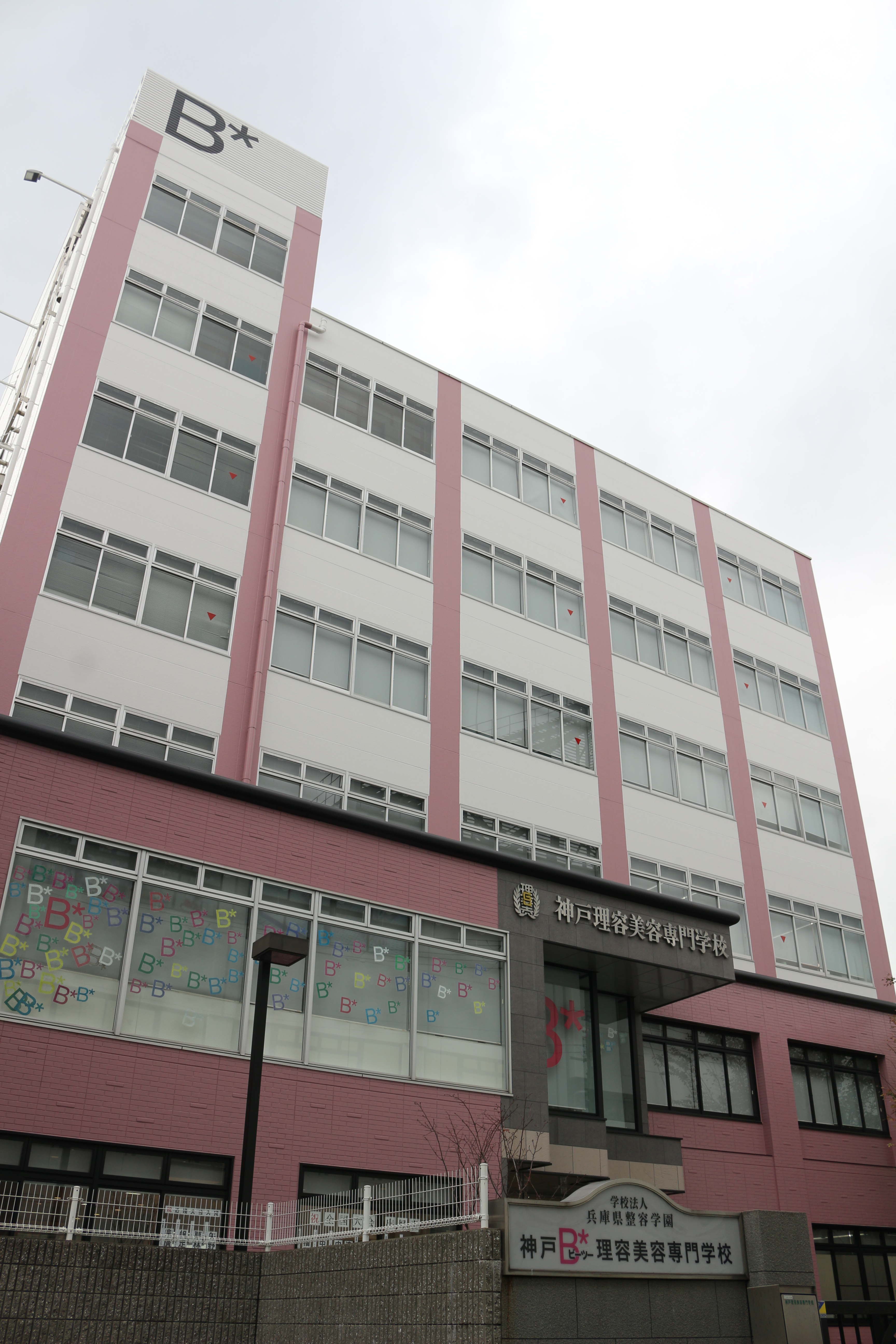 校舎が写ってる